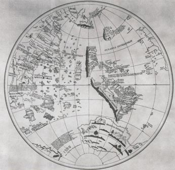 Mappemonde de Johannes Schoener